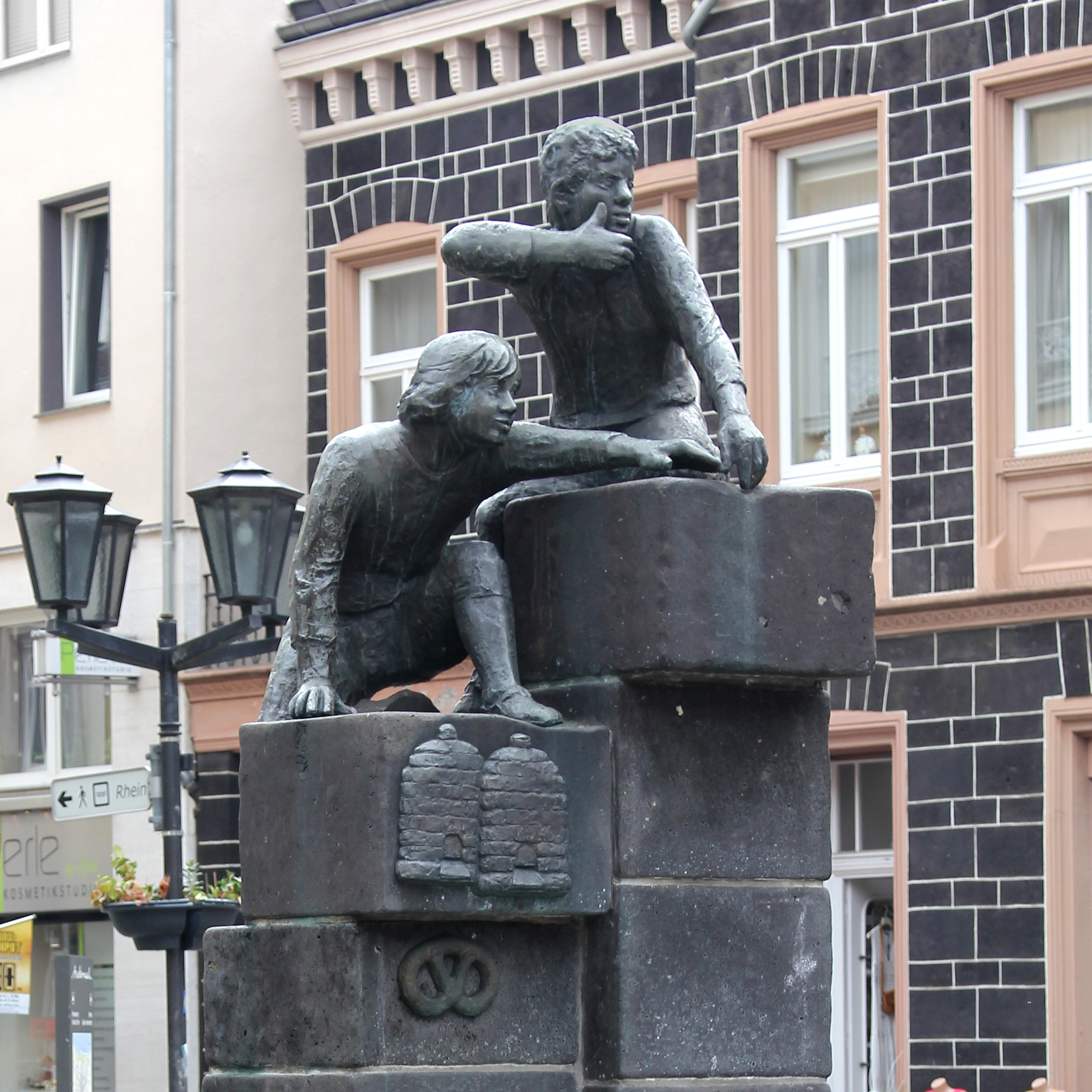 Bäckerjungenbrunnen in Andernach, Bronzeskulptur von Guta von Freydorf–Stephanow, 1984 (Blick von Südwesten)